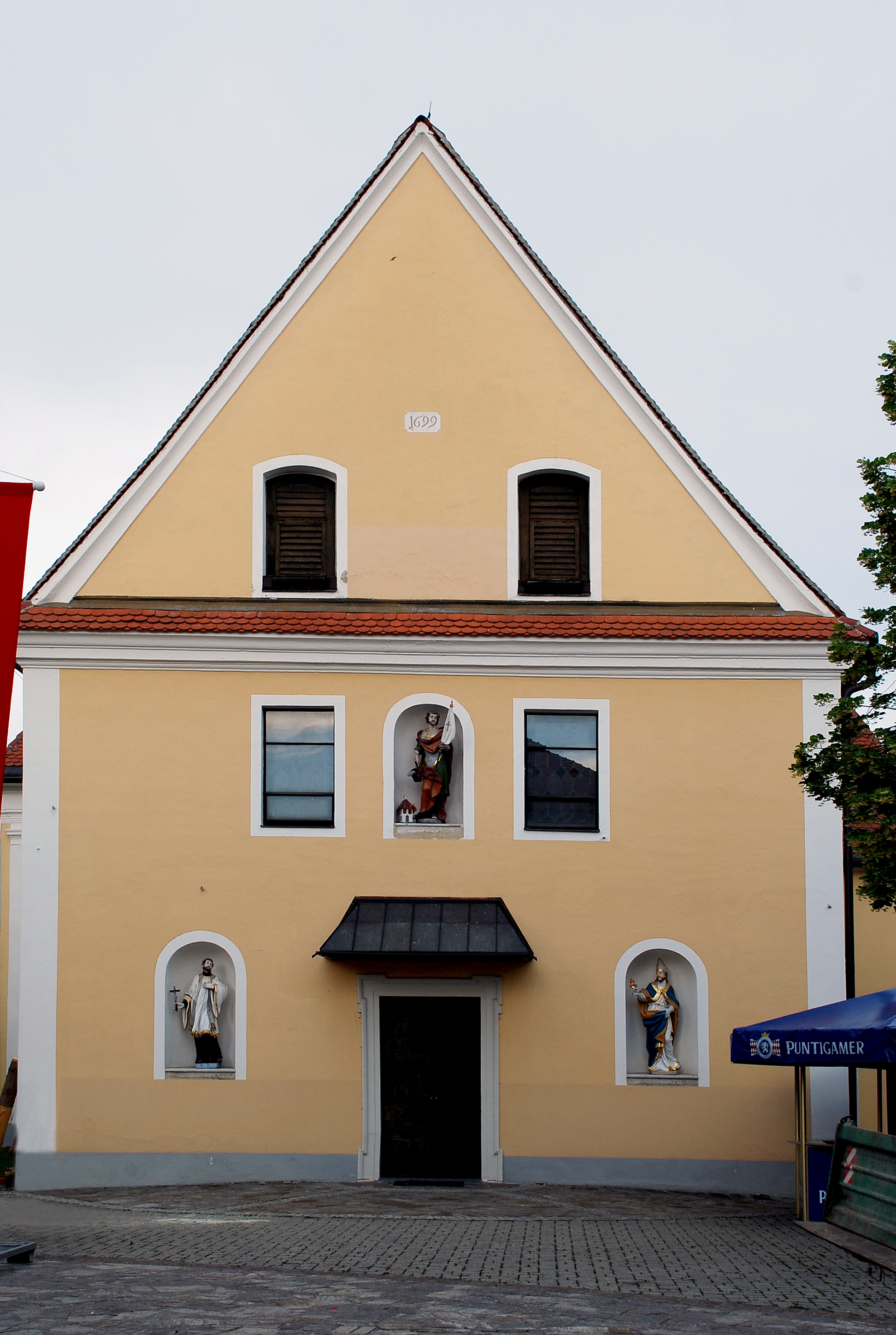 St Peter im Sulmtal, Steiermark, Österreich: Kirchenportal